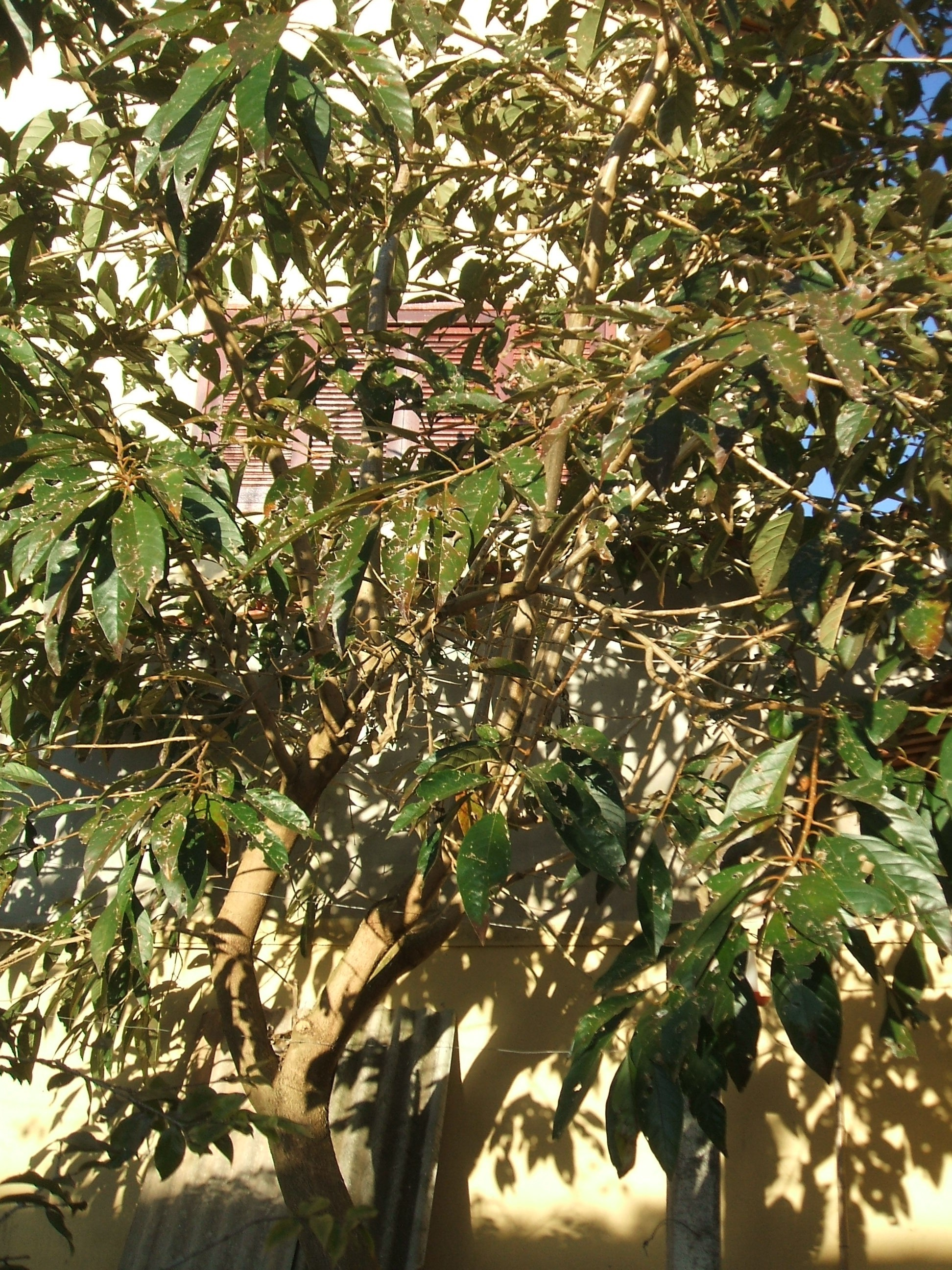 Foto de Acnistus arborescens, conhecida como Marianeira ou Fruto do Sabiá no sul de Minas Gerais - Brasil